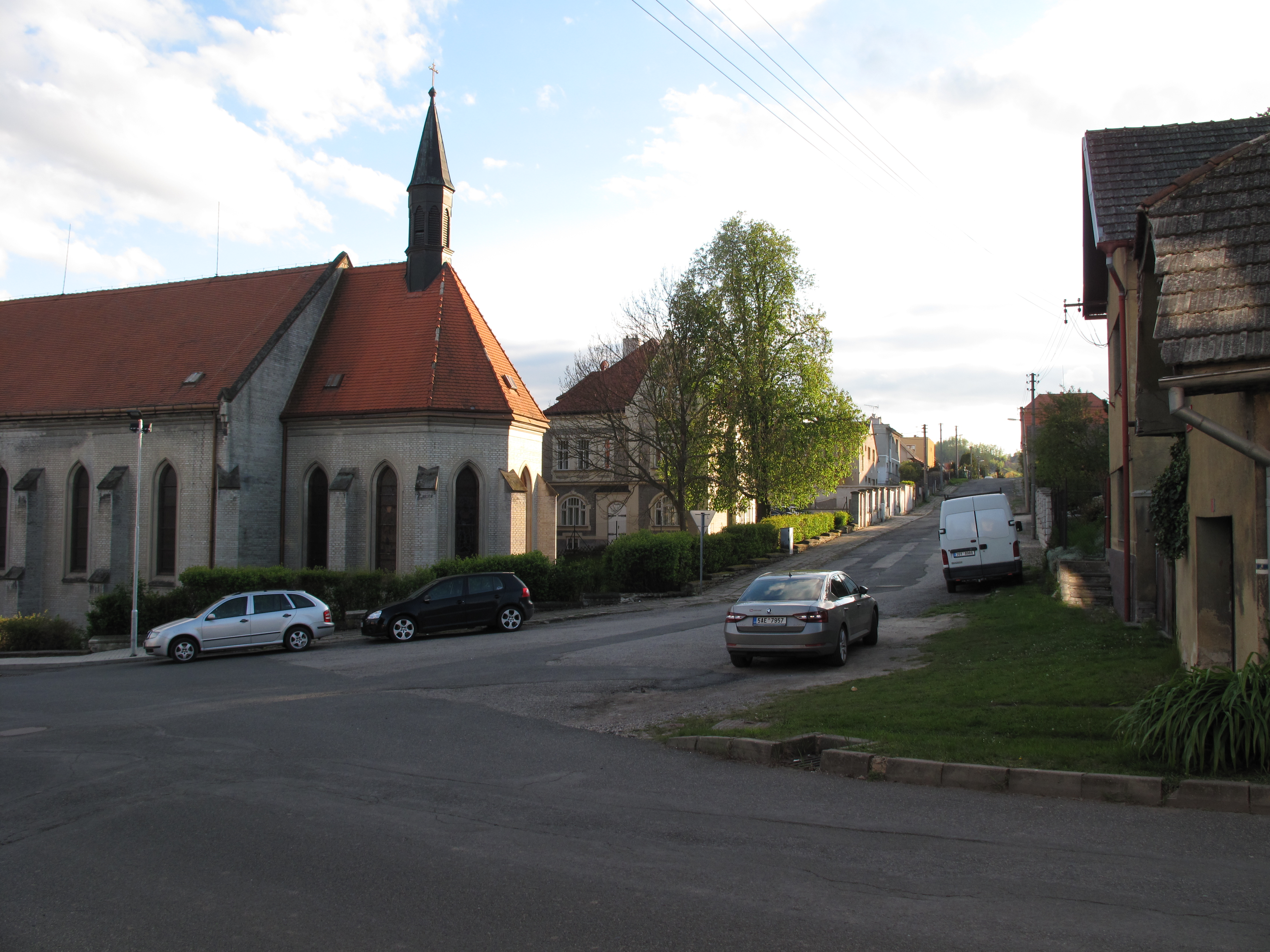 Libušín. Okres Kladno, Česká republika.